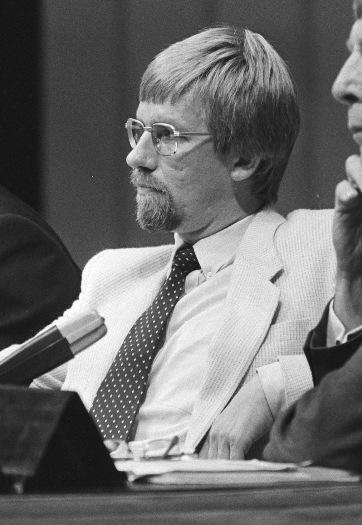 Collectie / Archief : Fotocollectie Anefo Reportage / Serie : Congres "Vrede en Veiligheid" in Den Haag Beschrijving : Congresleden (v.l.n.r.) dr. W. F. van Eekelen , mgr. drs. R. Ph. Bär , B. Tromp, drs. P. B. R. de Geus Datum : 25 september 1982 Locatie : Den Haag, Zuid-Holland Trefwoorden : congressen, forumleden, groepsportretten Persoonsnaam : Bär, R.Ph., Eekelen, W.F. van, Geus, P.B.R. de, Tromp, B. Fotograaf : Dijk, Hans van / Anefo Auteursrechthebbende : Nationaal Archief Materiaalsoort : Negatief (zwart/wit) Nummer archiefinventaris : bekijk toegang 2.24.01.05 Bestanddeelnummer : 932-3421